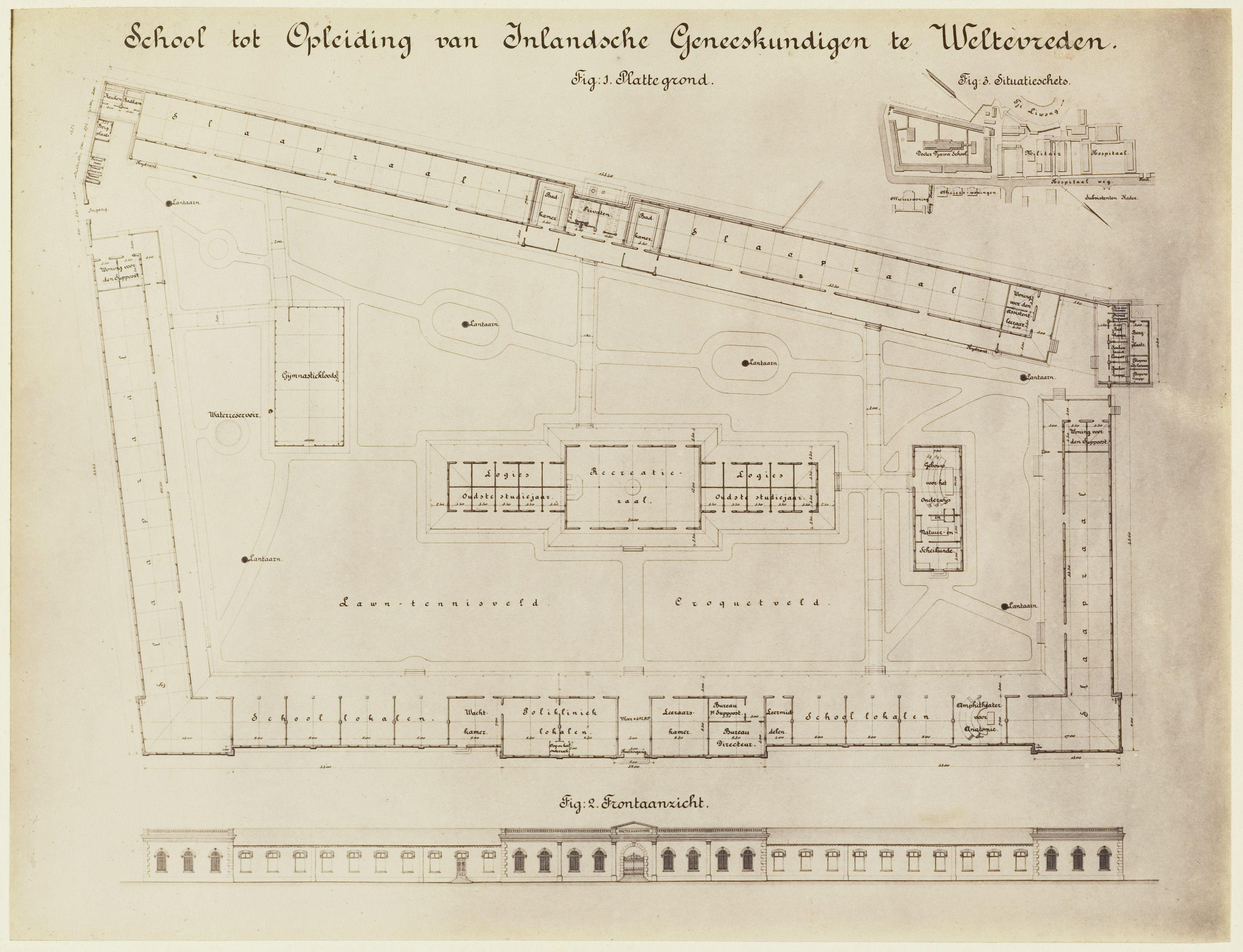 Title: Plattegrond, frontaanzicht en situatie van de School tot Opleiding van Inlandse Artsen (STOVIA) aan de Hospitaalweg te Batavia Image: code35821 Description: Plattegrond, frontaanzicht en situatie van de School tot Opleiding van Inlandse Artsen (STOVIA) aan de Hospitaalweg te Batavia Keywords: Jakarta Raya, maps, medical education, STOVIA, Indonesia Albumnumbe: r302 Album title: Ter herinnering aan de inhuldiging van koningin Wilhelmina en tot heil der bevolking van Nederlandsch Oostindië Artist: Tan Tjie Lan / Batavia DateCirca: 1902 Object type: Foto Additional: Ontwikkeling van het geneeskundig onderwijs te Weltevreden 1851-1926.- Weltevreden: S.T.O.V.I.A., 1926 Provenance: Antiquariaat Minerva / Den Haag Provenance type: Aankoop Acquisition date: 1992-12-08 Size: 19x25cm